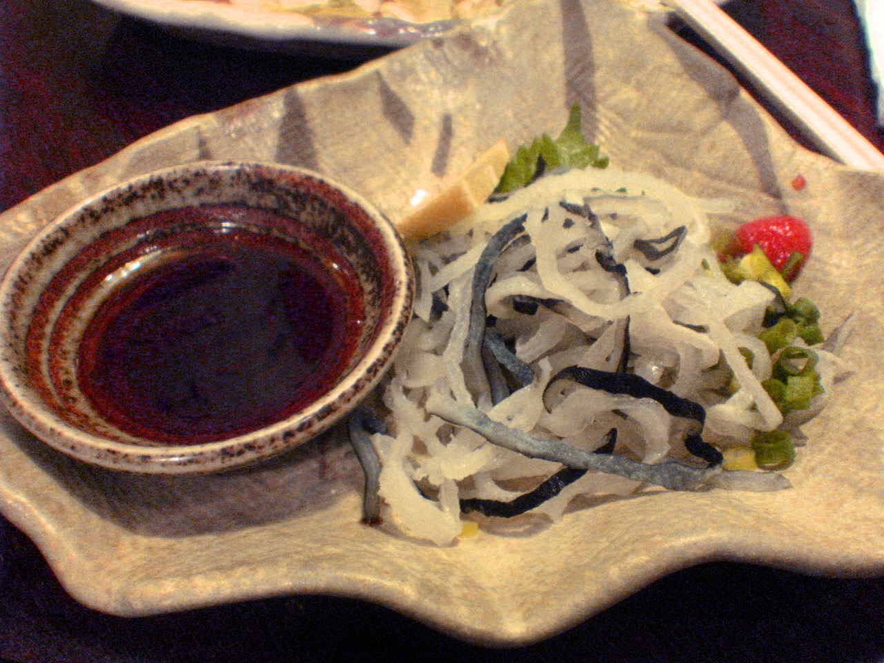 at Guri-dochin, a yakitori house in Kiyosumi Shirakawa